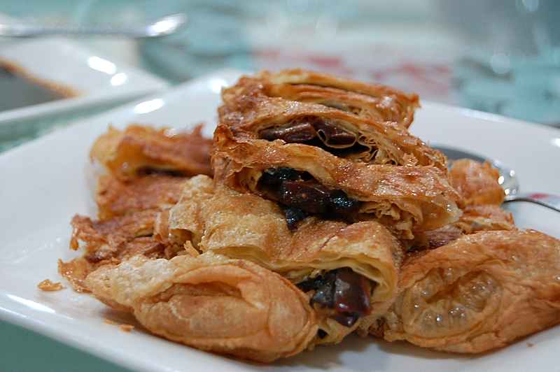 Vegetarian goose wrapped in tofu skin